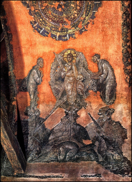 Άγιοι Απόστολοι Θεσσαλονίκης. Η Μεταμόρφωση του Χριστού. Ψηφιδωτή παράσταση των ετών 1310-1314